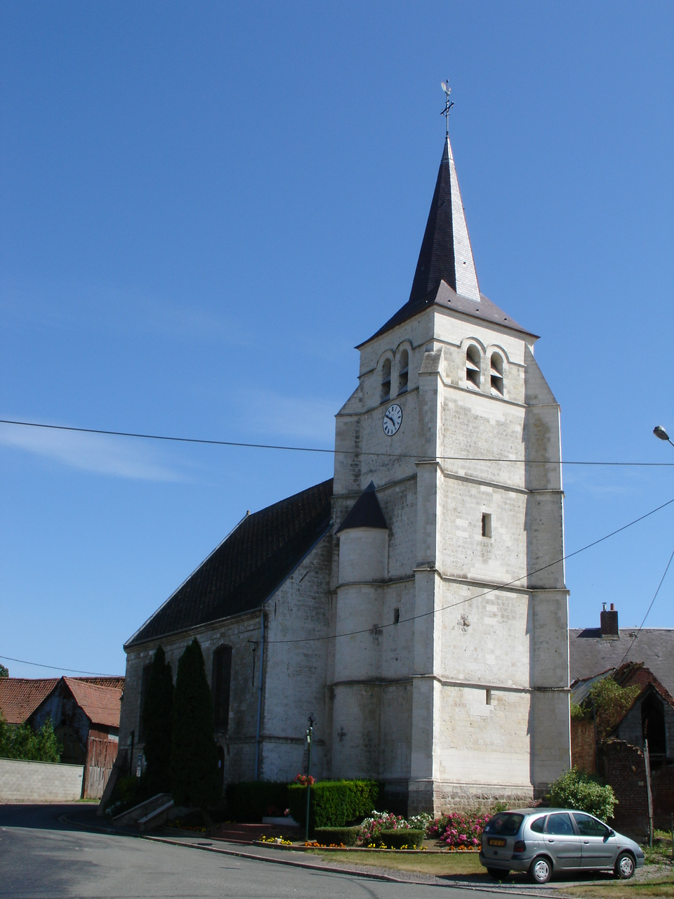 Église de Saint-Amand-les-Pas